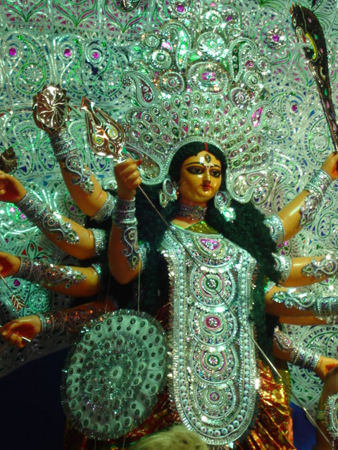 Durga before puja